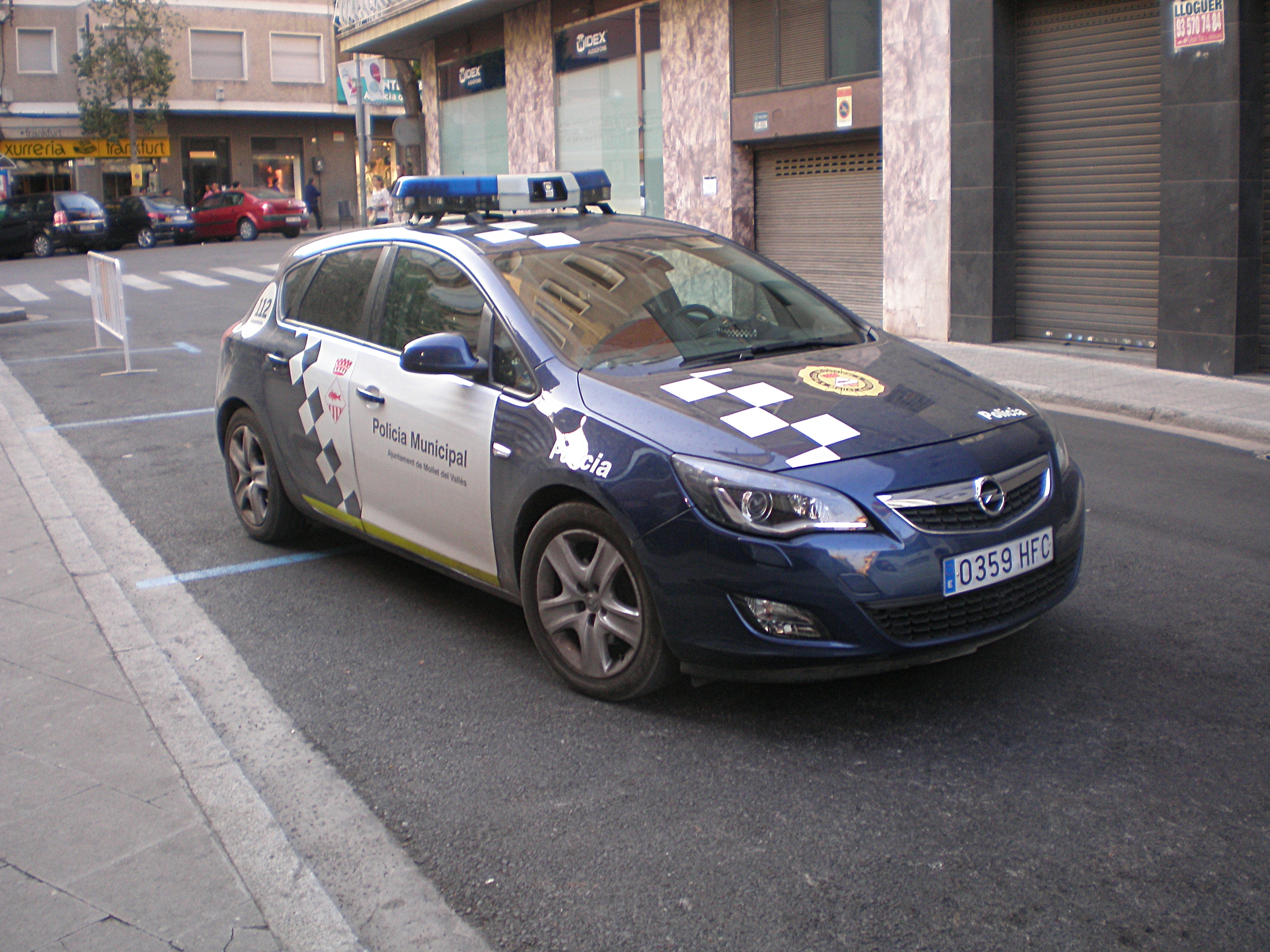 Mollet del Vallès: Coche de la policia municipal en la calle Luís Durán.